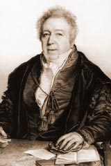 Jozef Kluyskens - rector Universiteit Gent - België